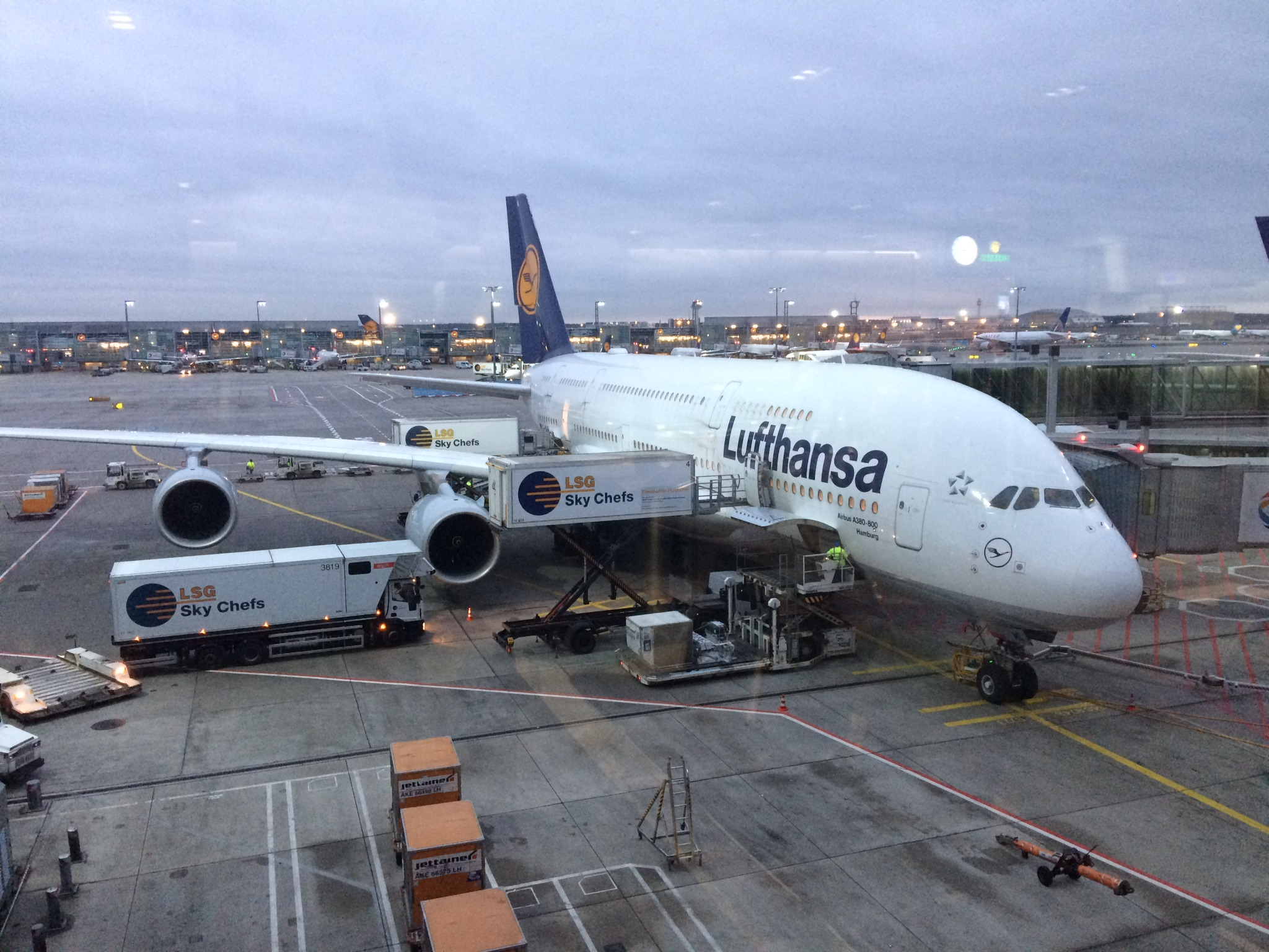 Lufthansa Airbus A380-800